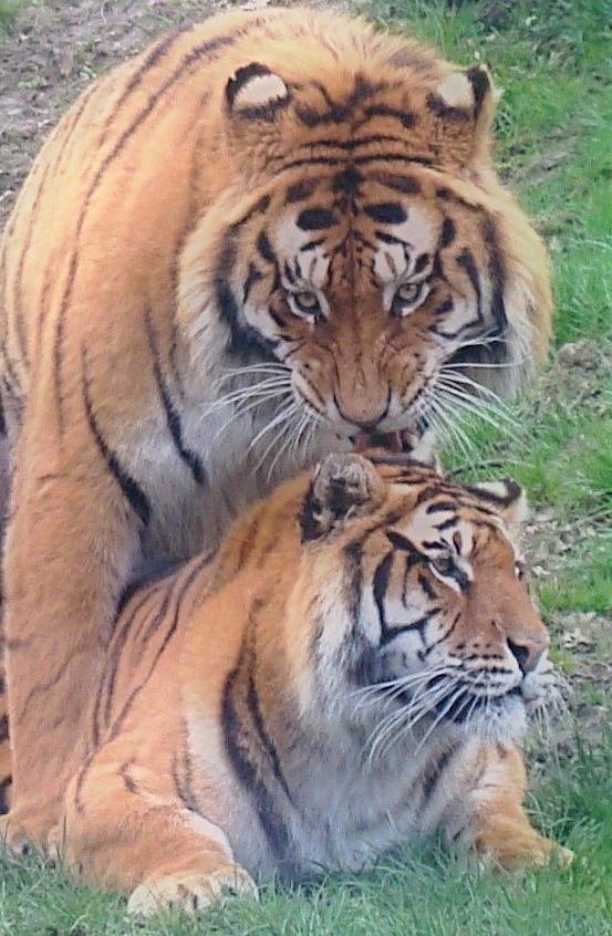 Bellewaerde Park - Belgium. Explore : Apr 4, 2009 #164